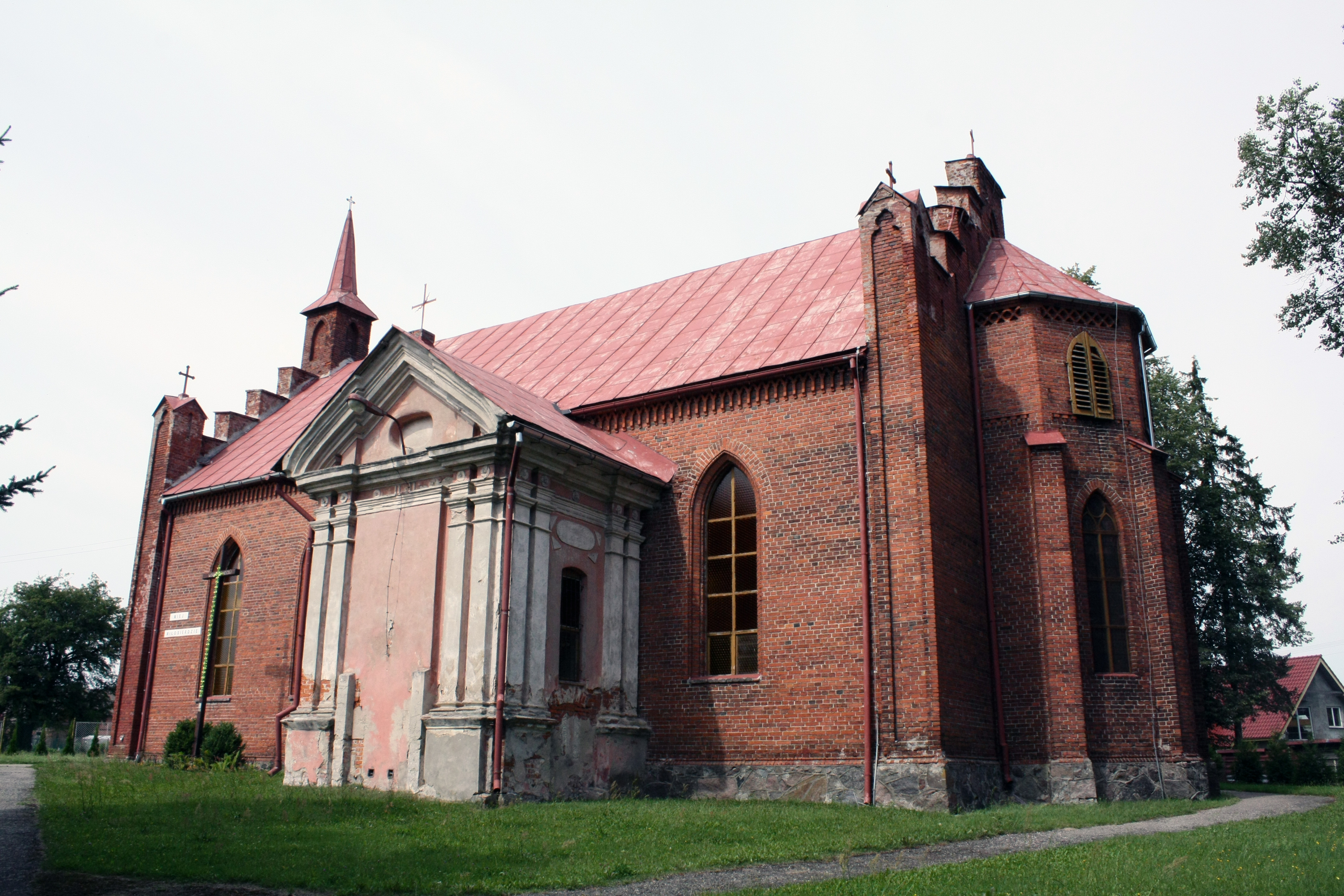 Siemczyno - zespół dawnego kościoła ewangelickiego, obecnie rzymskokatolickiego parafialnego pw. Matki Boskiej Różańcowej, 1854-1856